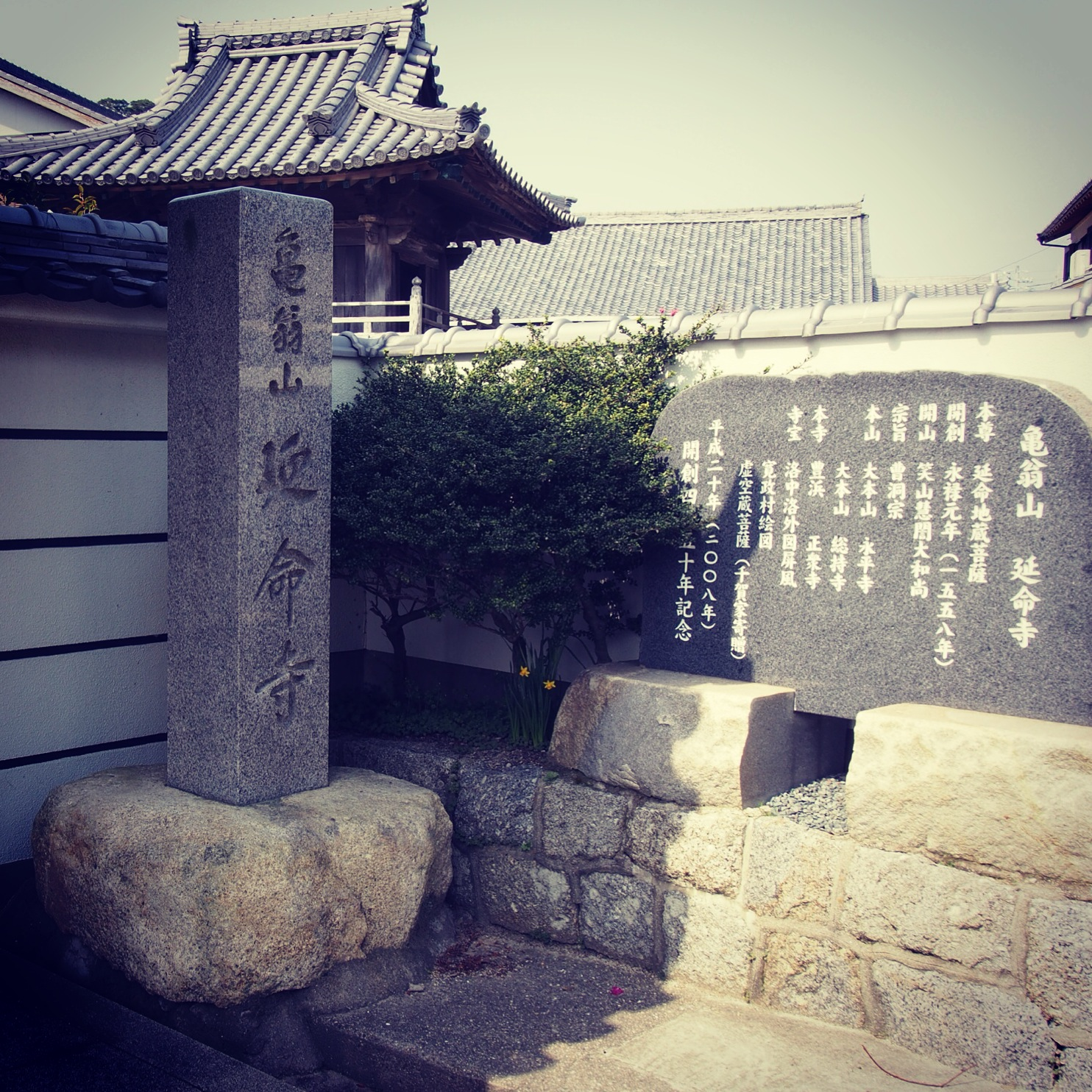 SignEmneiji